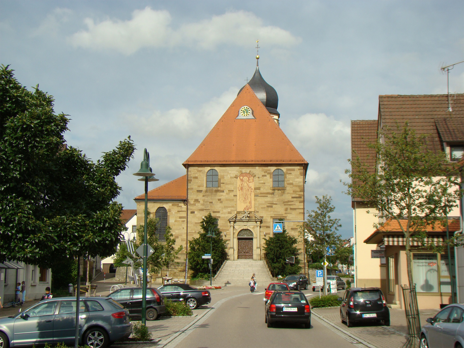 Westansicht der Mauritiuskirche in Oedheim